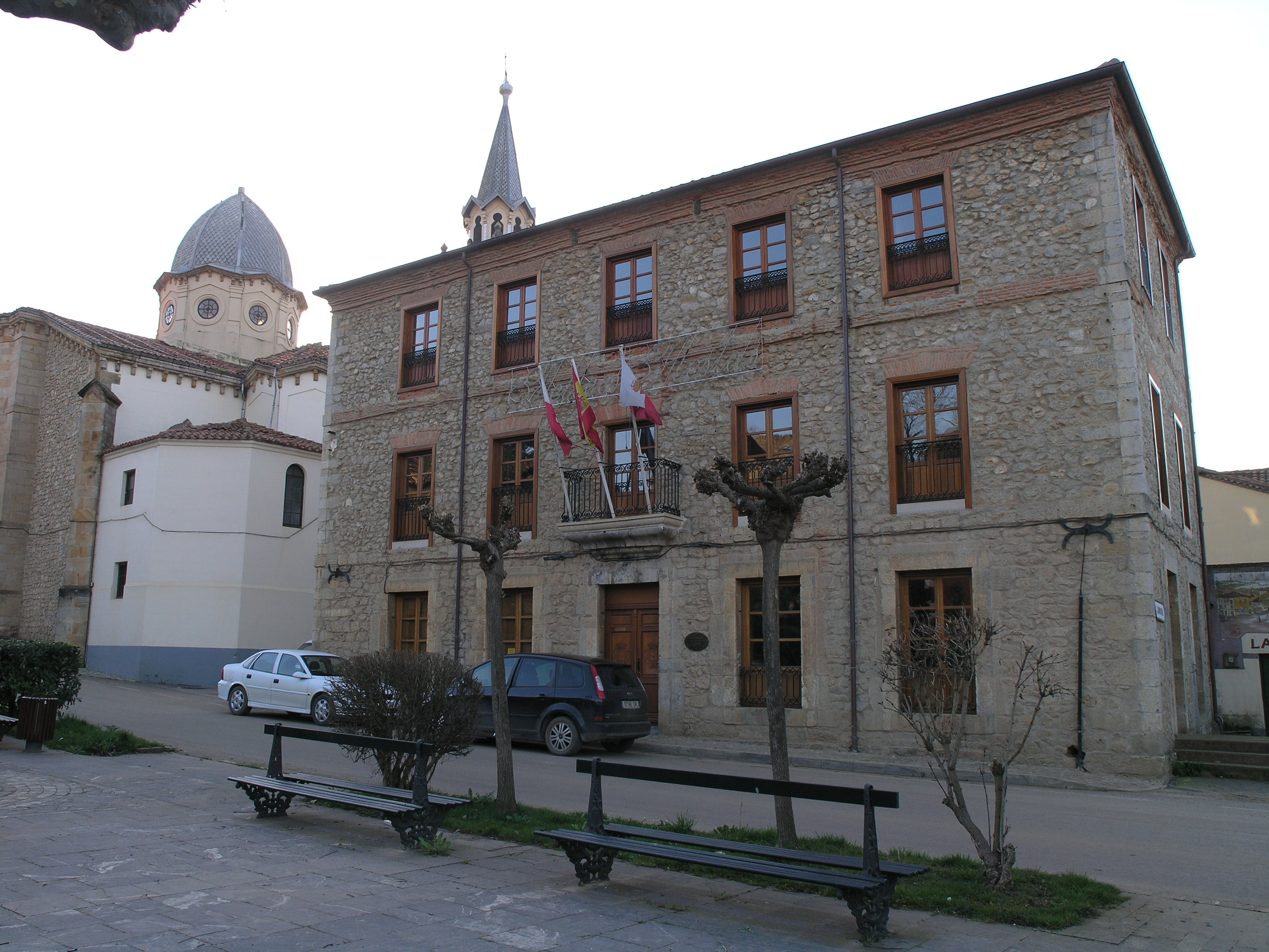 Ayuntamiento de Ruiloba, Cantabria, España, en el barrio La Iglesia. Detrás, la iglesia parroquial de la Asunción.